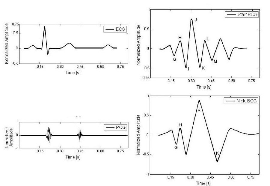 Typický průběh BKG vlny. Sestupně: Elektrokadiogram, Fonokardiogram, Starrův balistokardiogram, Nickersonův Balistokardiogram.